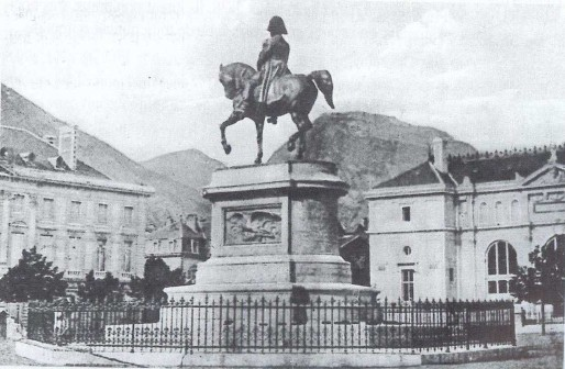 Statue de Napoléon Bonaparte sur la place de la Constitution (actuelle place de Verdun) de Grenoble en 1868. Installée le 17 août 1868 devant une foule considérable, cette statue a été enlevée le 4 septembre 1870 et déplacée à Laffrey à 30 km au sud de Grenoble, où elle se trouve encore. Sculpteur Emmanuel Frémiet